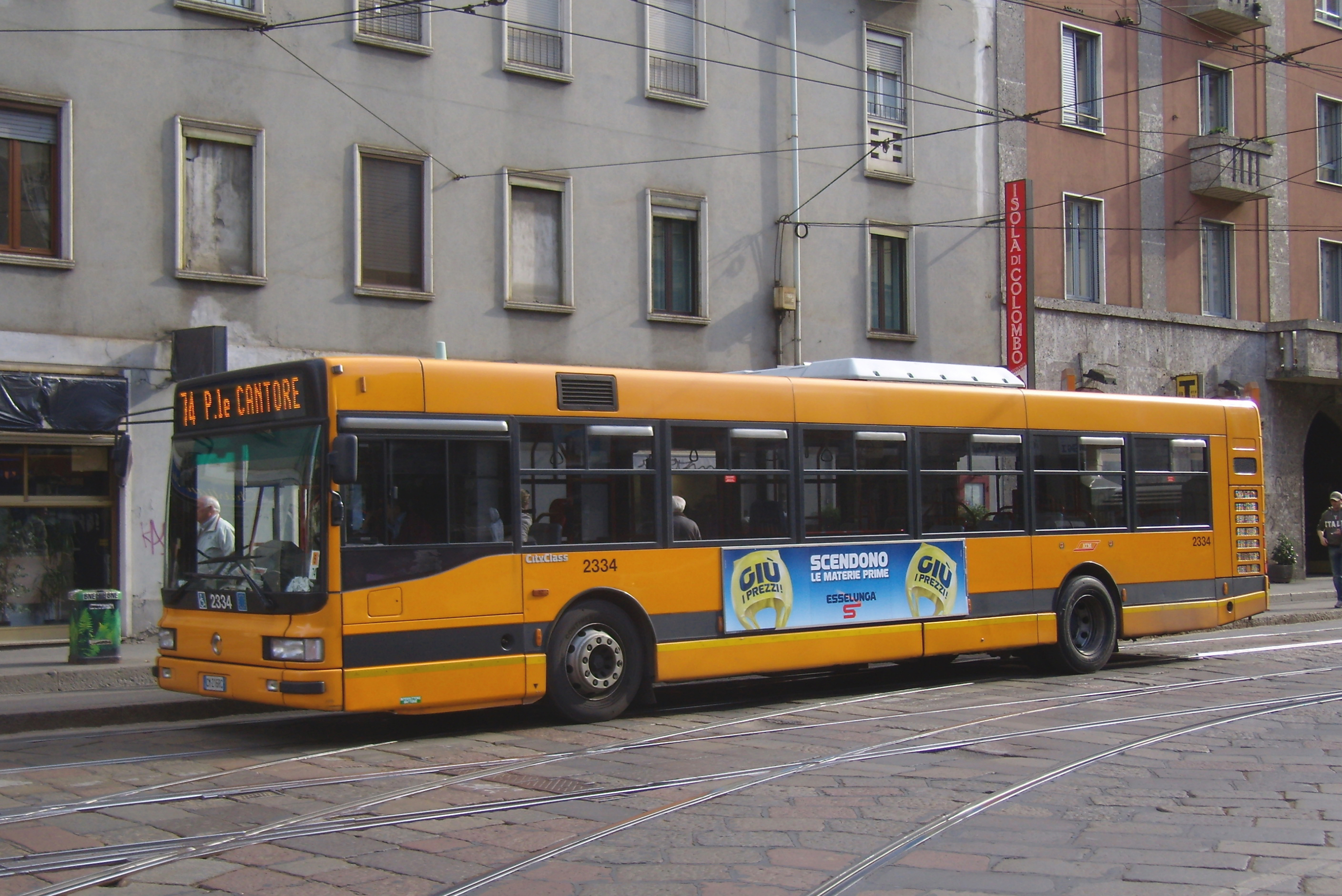 Autobus Irisbus CityClass dell'ATM di Milano in corso Colombo, in servizio sulla linea 74.